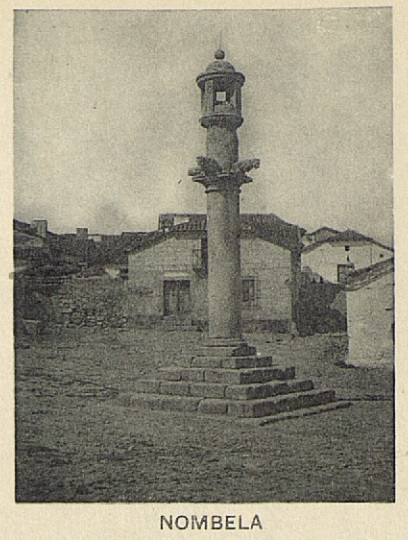 Rollo o picota de Nombela